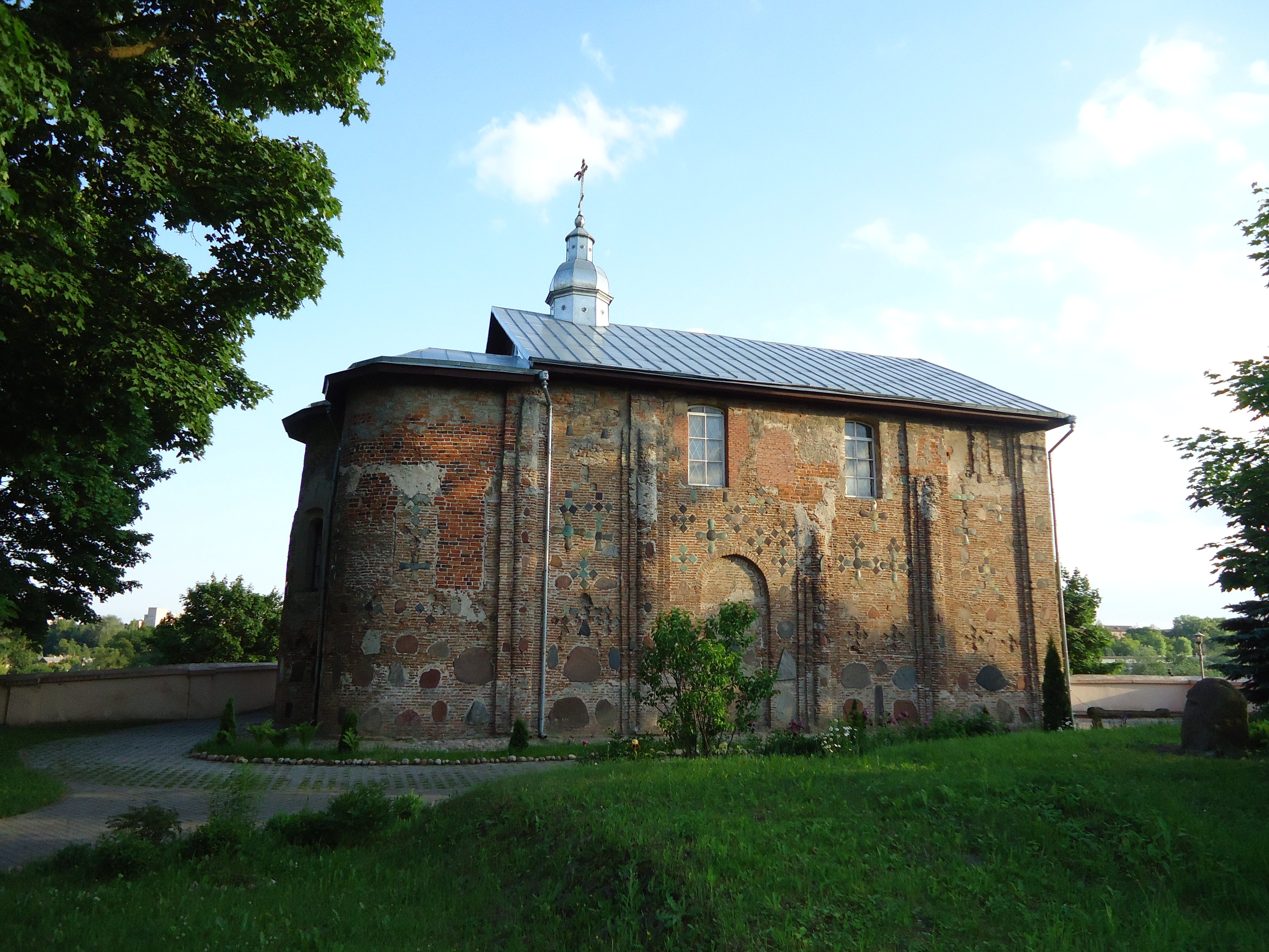 Kalozha - Каложа